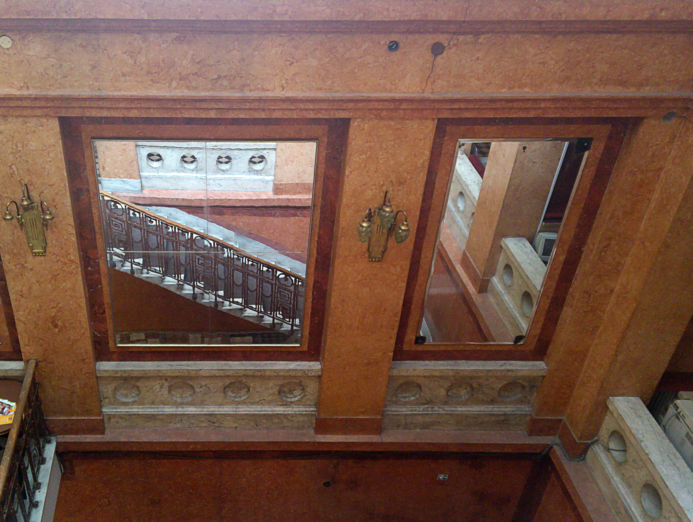 Beograd Prometna banka ugao Knez Mihailove 26 i Zmaj Jovine 12